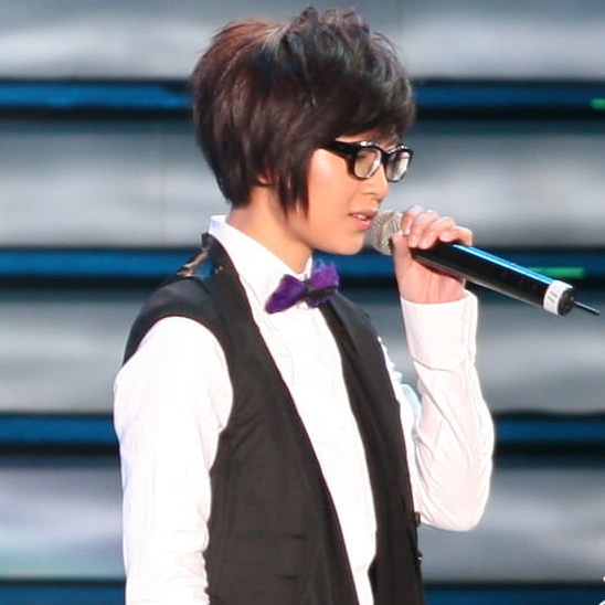 周笔畅，中国超级女声之一。